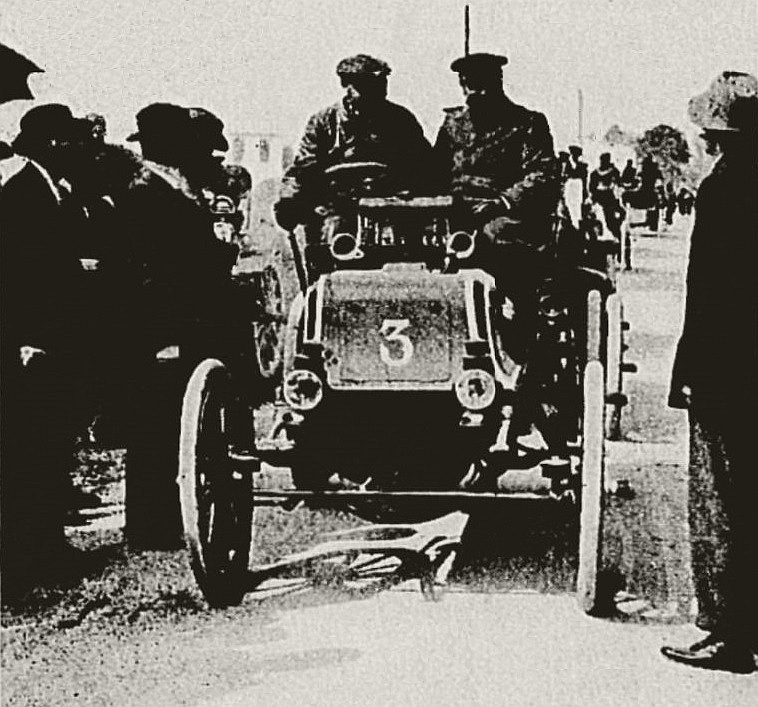 Adolphe Clément-Bayard sur Panhard du Prince Orloff, vainqueur du troisième Prix d'Amsterdam en 1898 - La Revue Illustrée du 15 juin 1898, article "Les Automobiles Panhard & Levassor" de VIDI